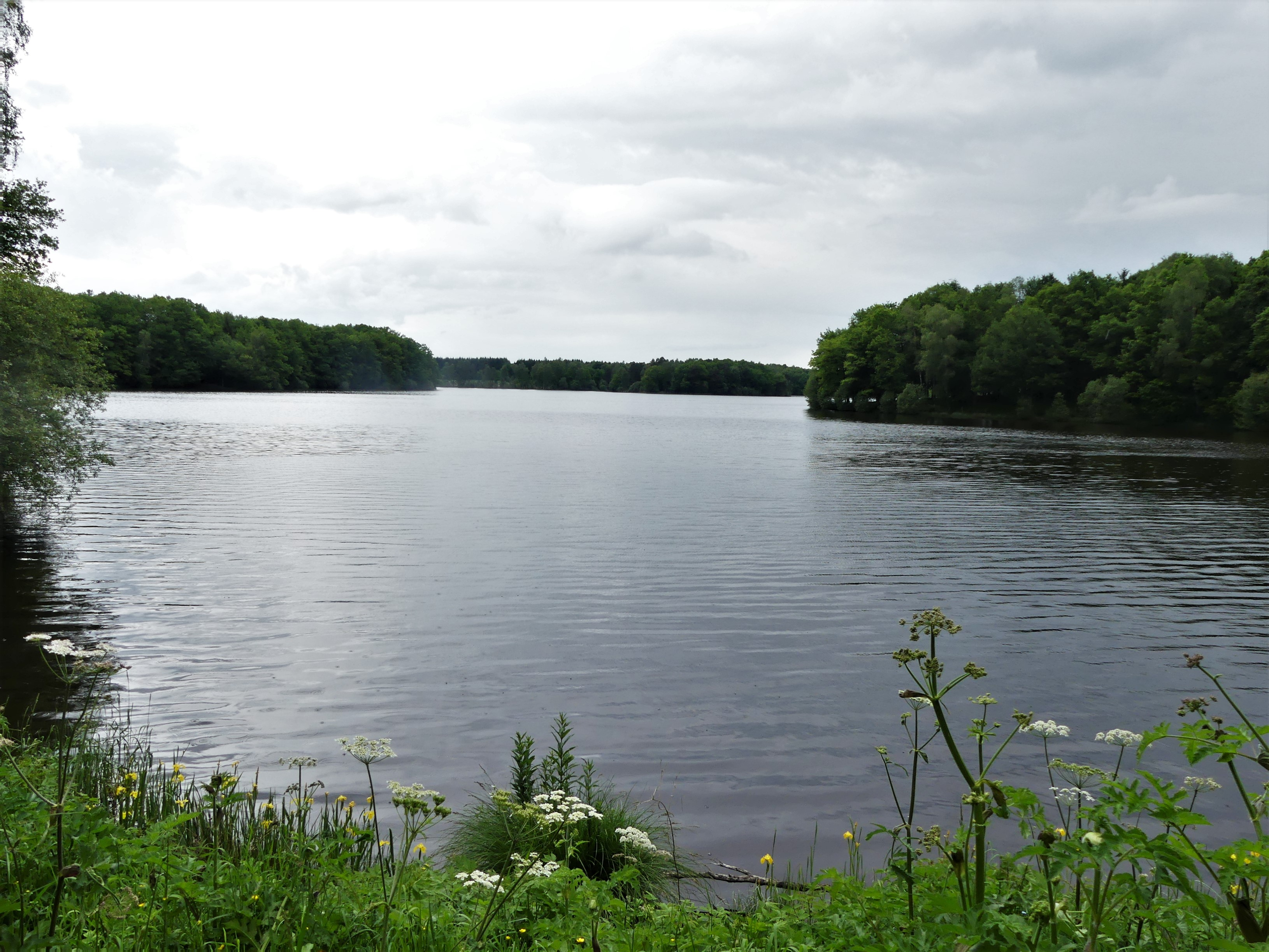 L'étang de la Ramade vu depuis la route départementale 30, Flayat, Creuse, France.